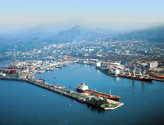 ბათუმი